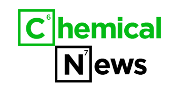 케미컬뉴스 BI